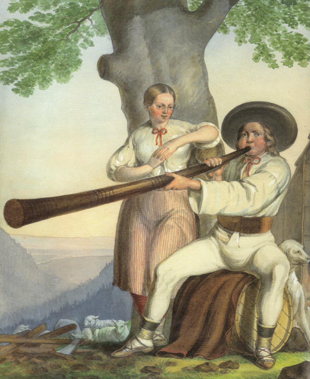 Akwarela Henryka Jastrzembskiego przedstawiająca Górali z Istebnej z 1846 roku.